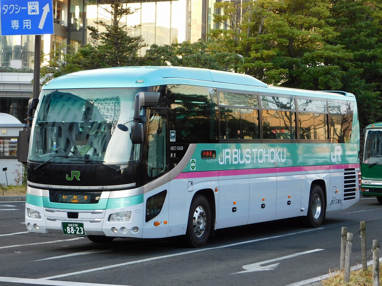 ジェイアールバス東北 日野・セレガ「はやぶさカラーバス」高速バス「仙台 - いわき線」で運用中